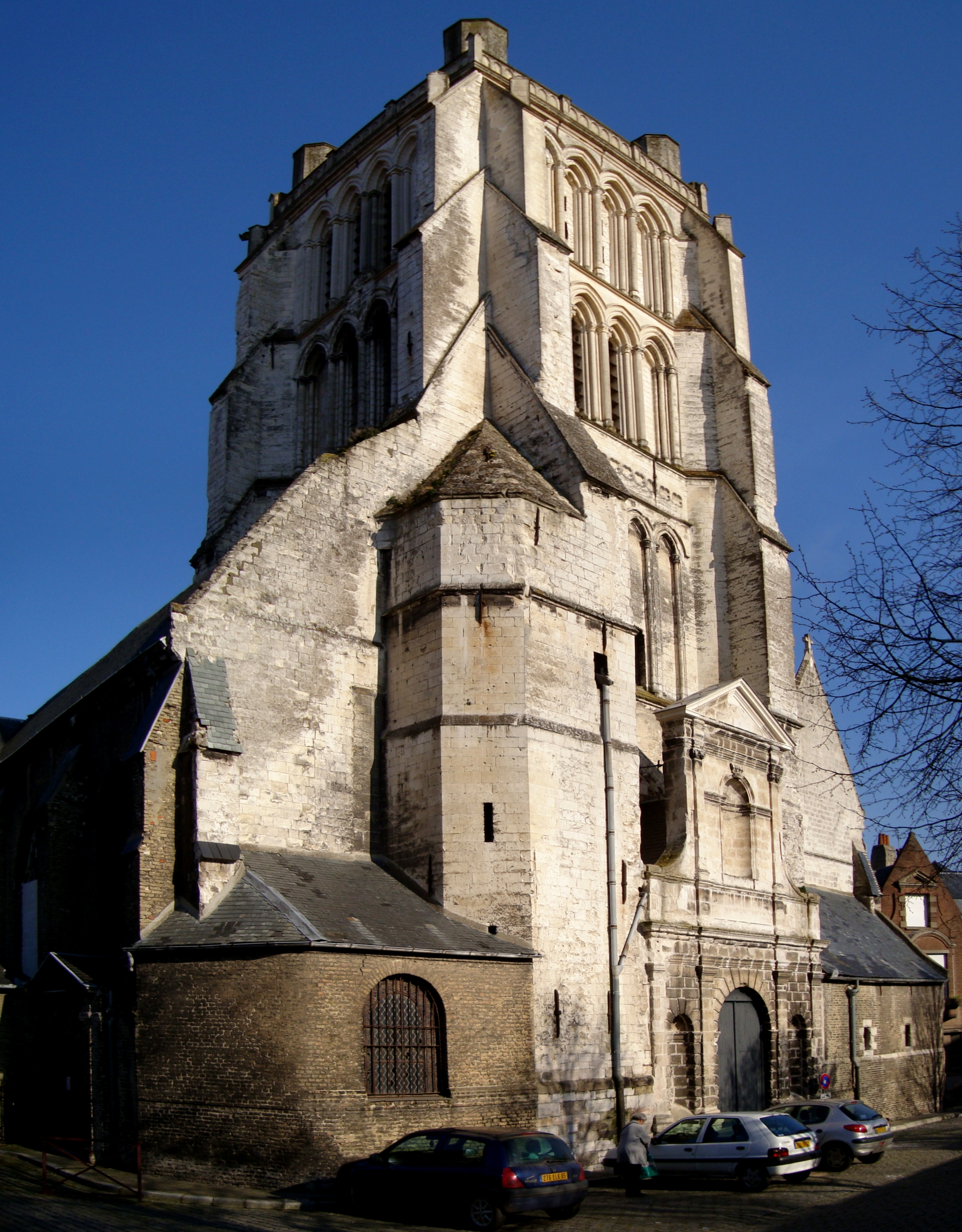 La tour gothique du XIIIe siècle de l'église Saint-Denis de Saint-Omer (Pas-de-Calais).